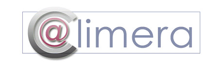 ПРОЕКТ КАЛІМЕРА (CALIMERA)